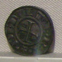 Volterra, repubblica, fine XIII sec.